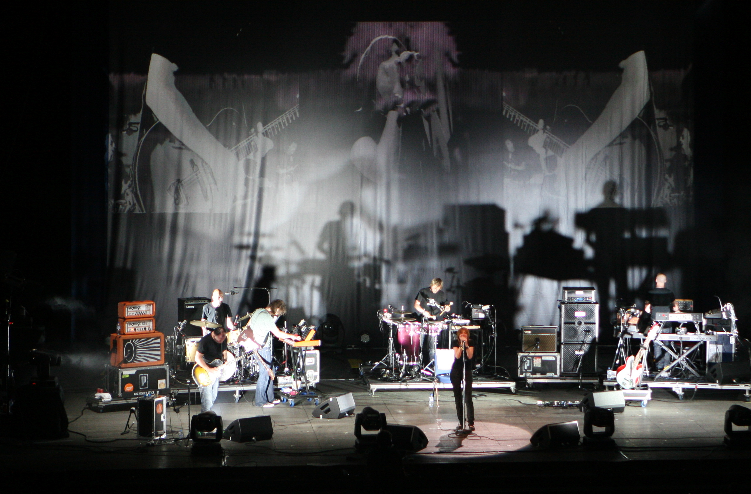 Concierto de Portishead en el Primavera Sound 2008 (escenario Rockdelux)